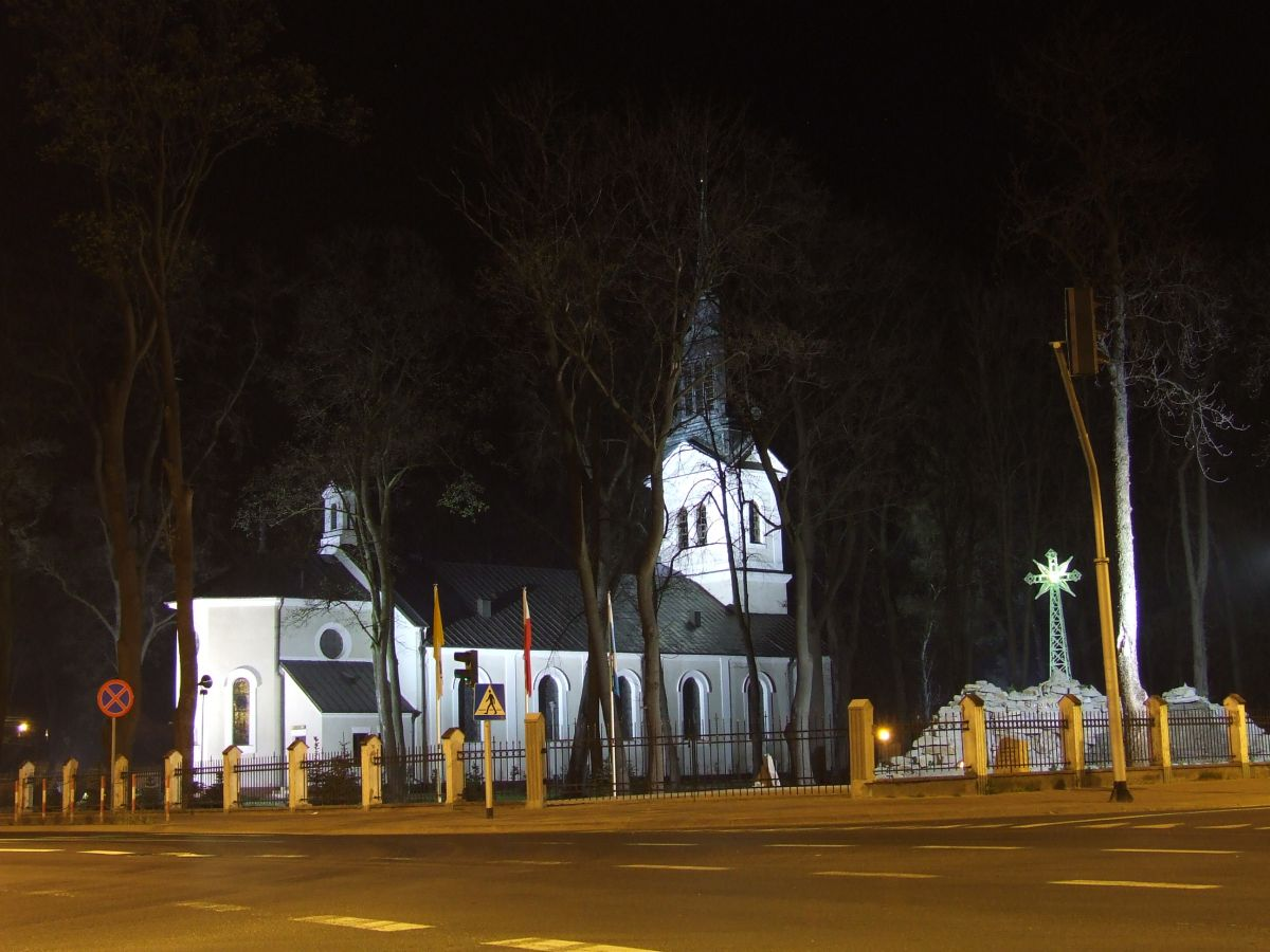 Kozienice - kościół Świętego Krzyża (zabytek nr 277/A)